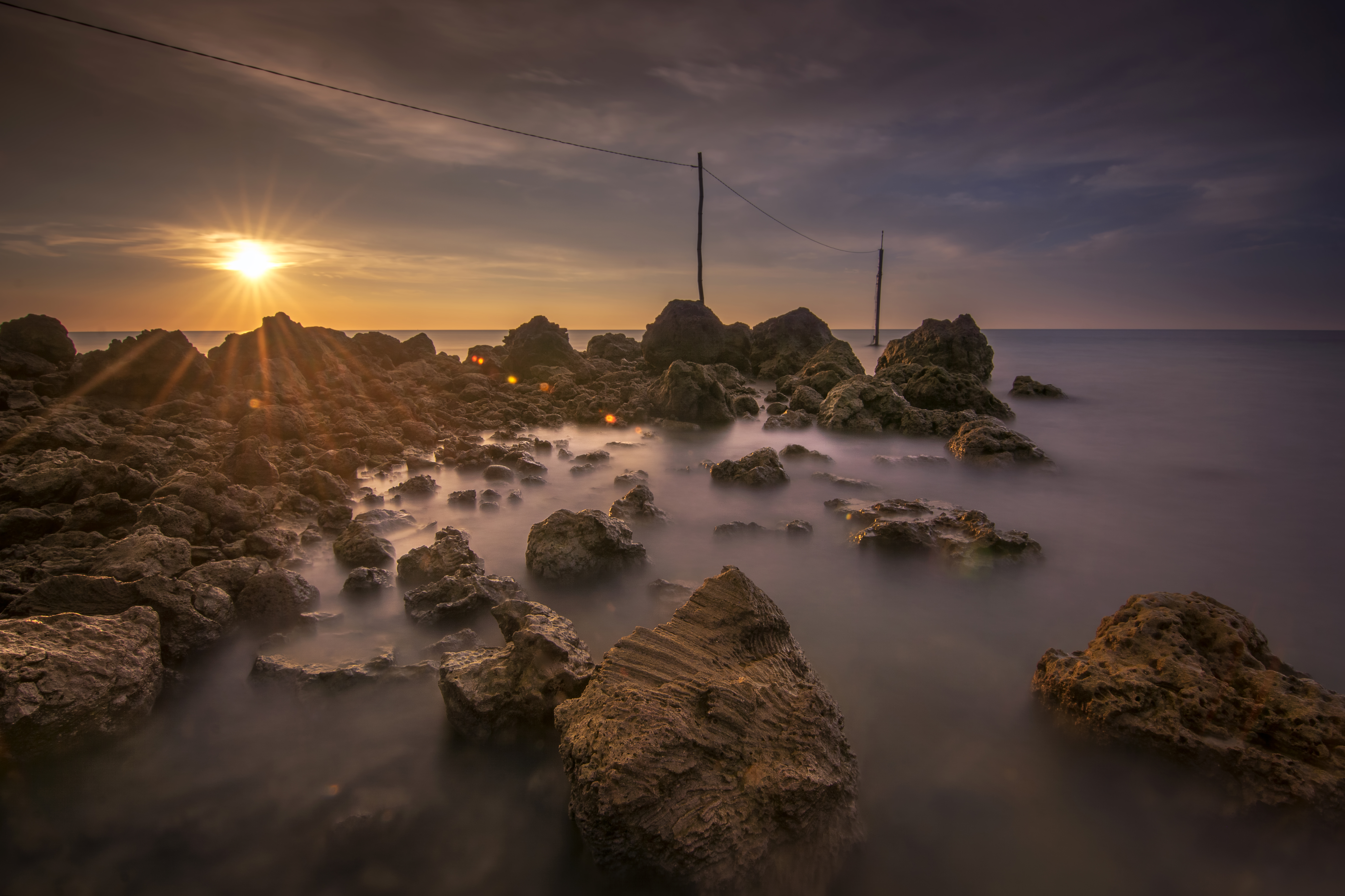 lokasi di kandang semangkon , paciran, lamongan jawa timur